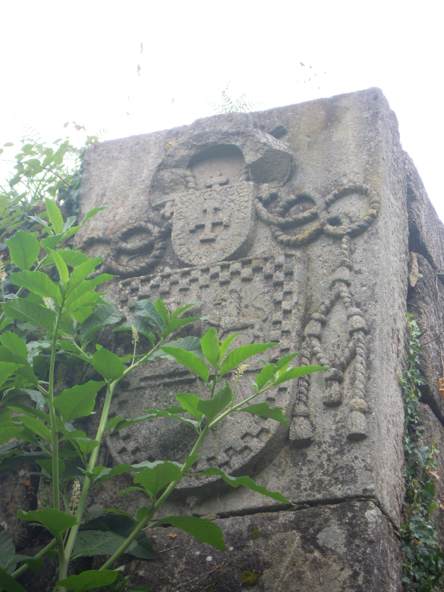 Escudo na entrada do Forte de San Lourenzo, en Goián (Tomiño)